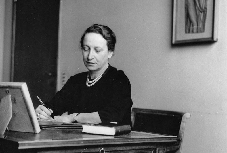 Fernanda Wittgens, direttrice della Pinacoteca di Brera.